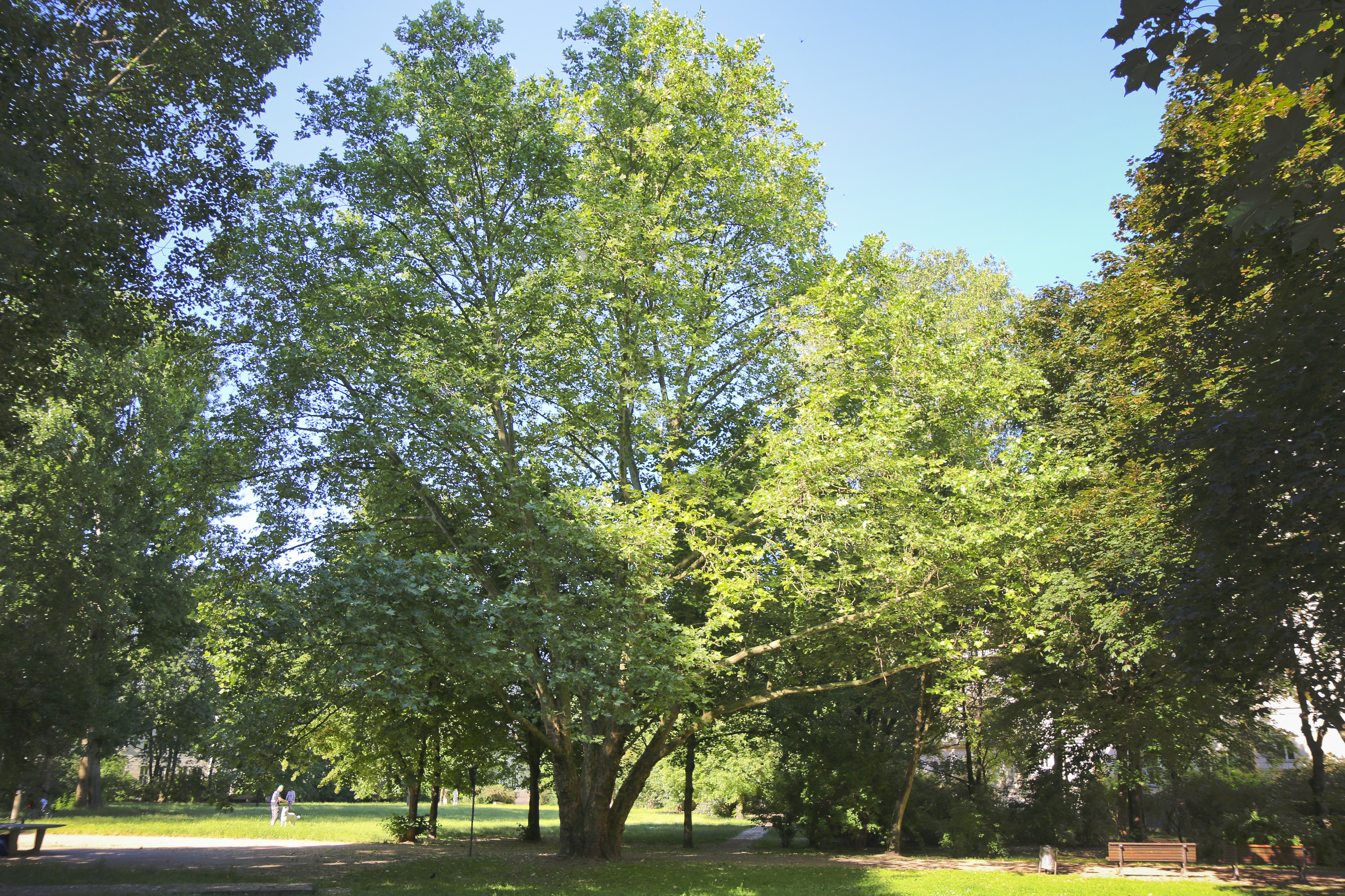 Platanus x acerifolia (V-22/B) Platane im Hofbereich Löwestraße 10 A, 10249 Berlin; Berlin Friedrichshain, 10249, Löwestraße 10A, Hofbereich/Park, Naturdenkmal (Schönheit)